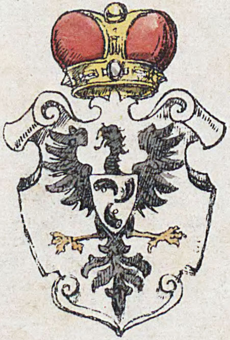 Беларуская (тарашкевіца): Герб Барбары Радзівіл (Barbara Radzivił) Трубы (Truby) як каралевы і вялікай княгіні